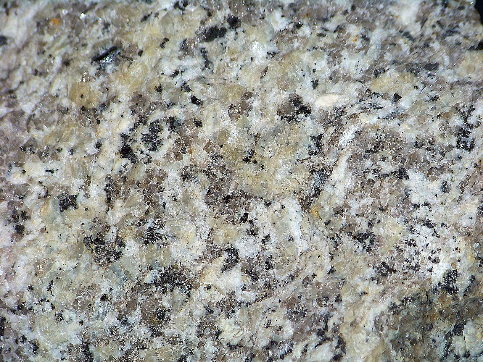 Granit z masywu strzelińskiego, Polska